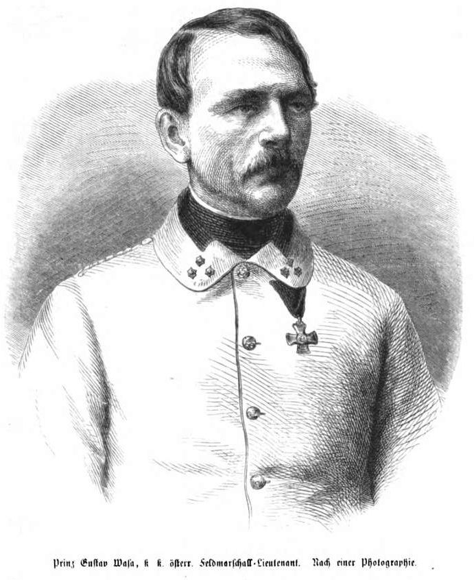 Gustav Wasa, Nachkomme des ehemaligen schwedischen Königshauses als österreichischer Feldmarschall-Leutnant, 1862.